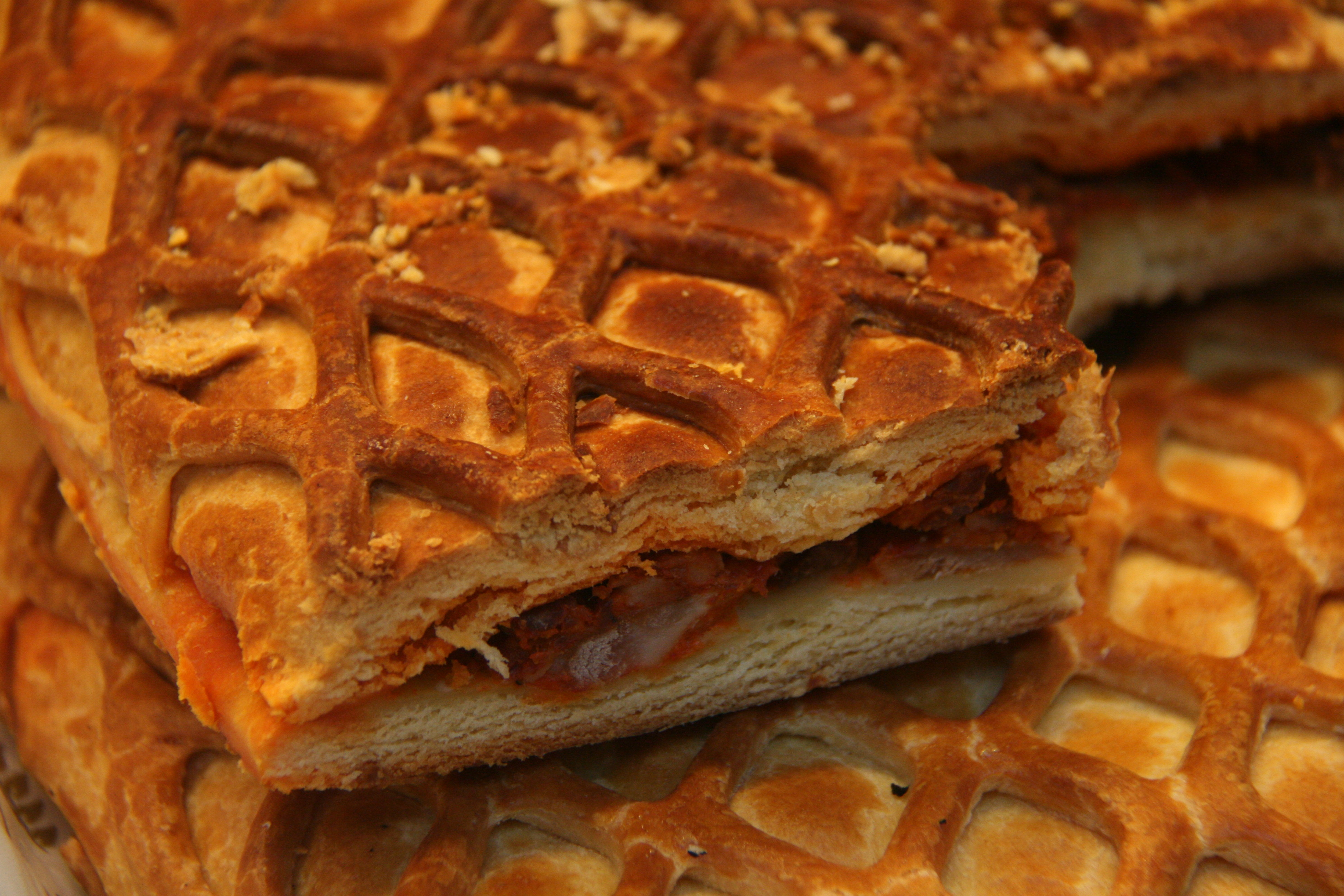 Hornazo, mostrando su interior y la masa